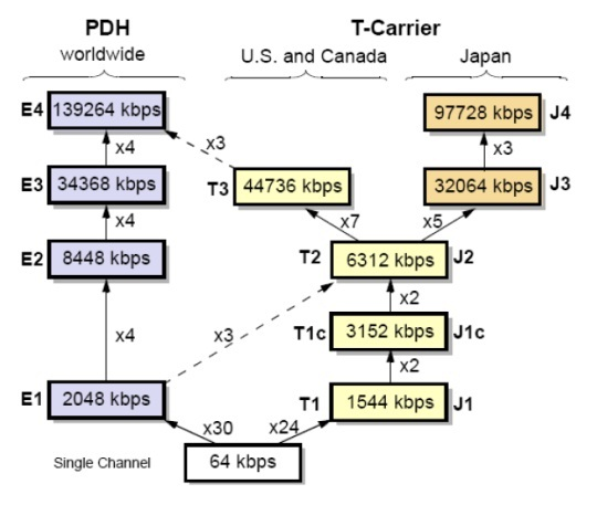 Niveles de PDH